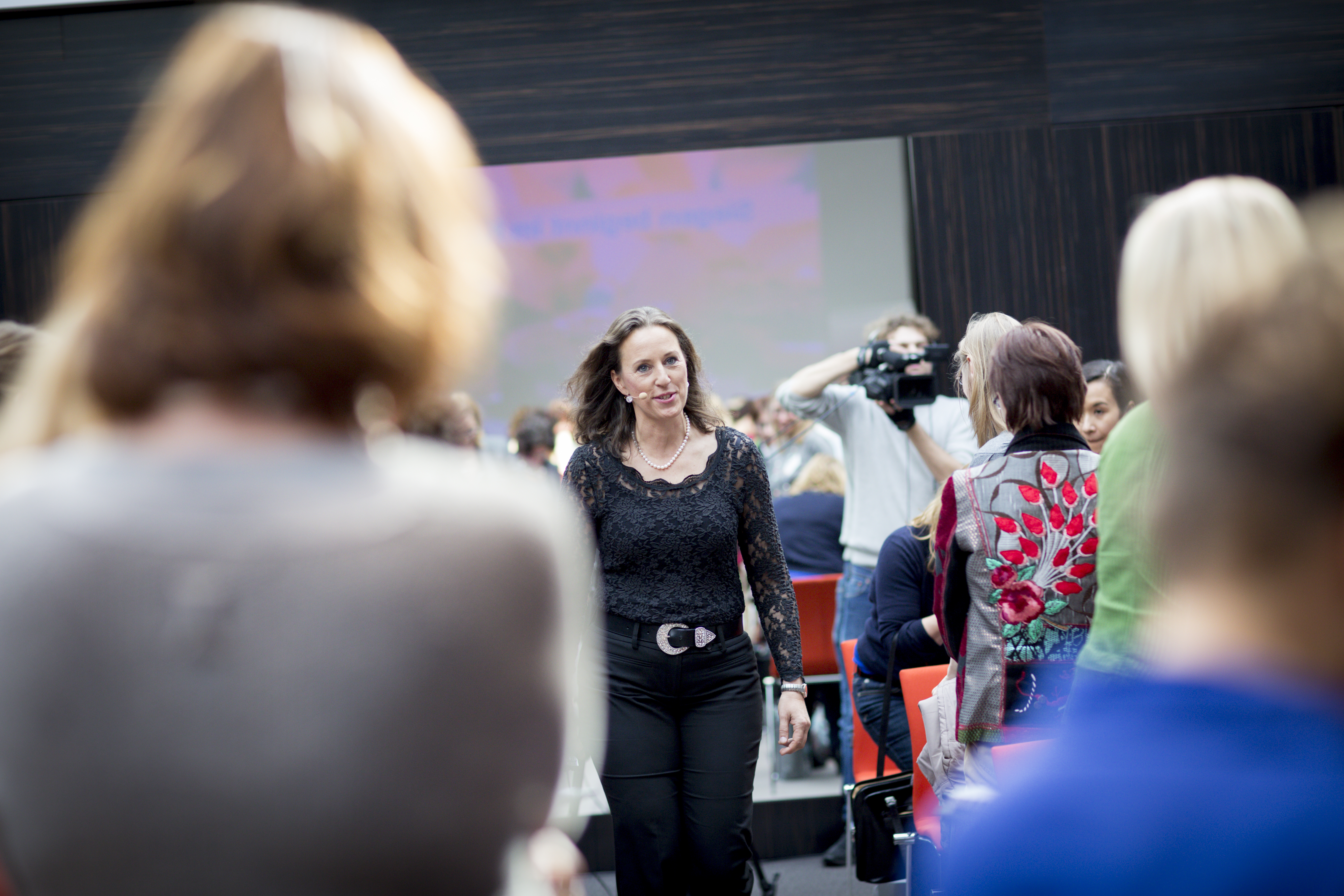 Deutsche Speakerin Antje Heimsoeth